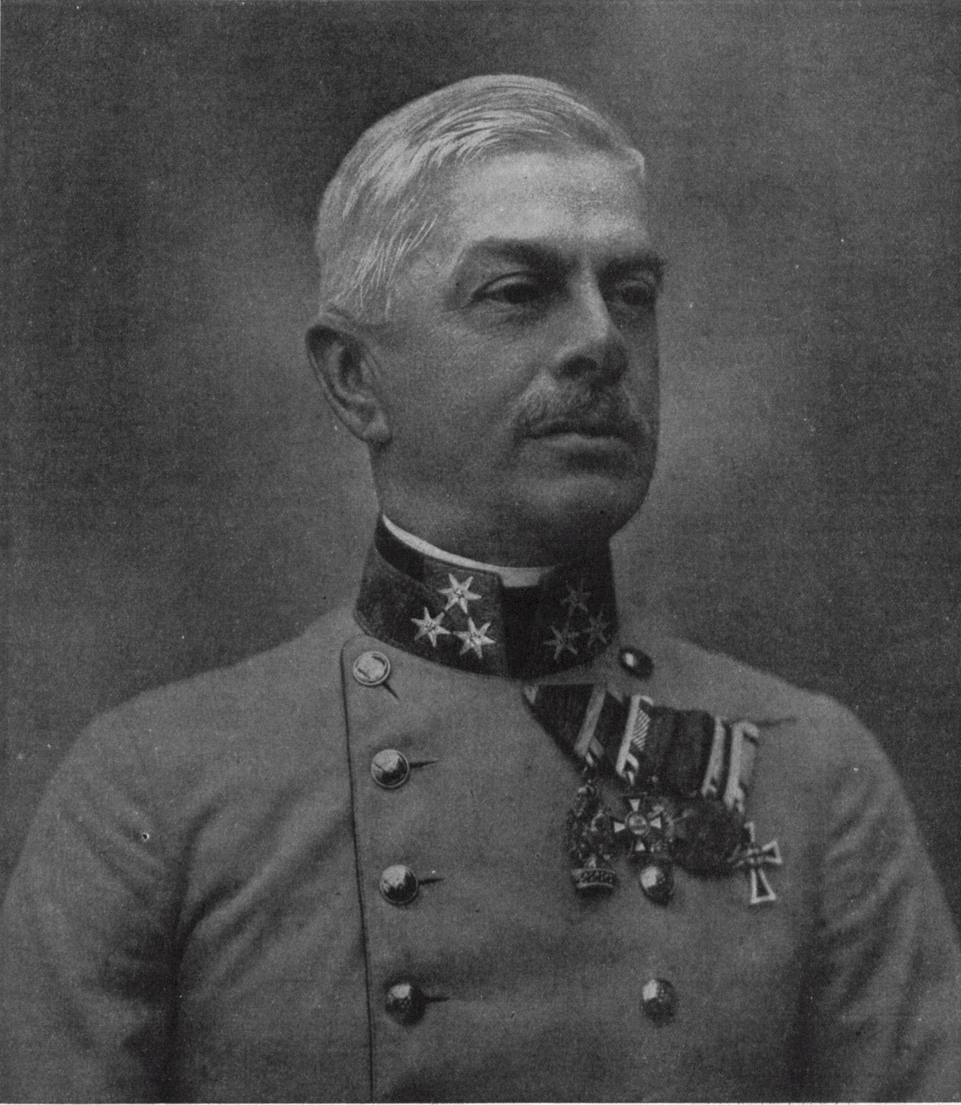 Rudolf Freiherr Stöger-Steiner von Steinstätten (1861-1921), Austrian-Hungarian general and politician